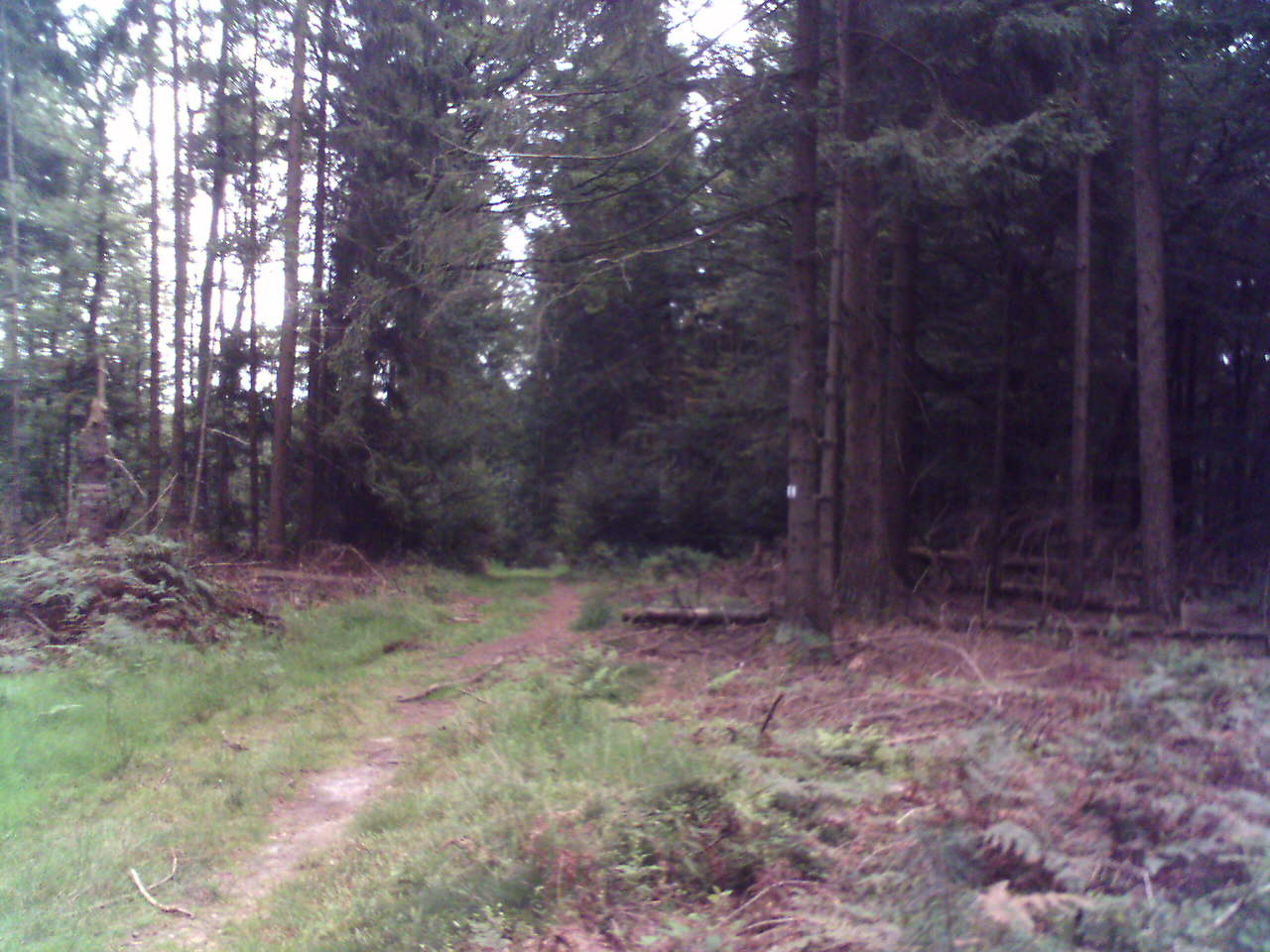 Gipfel der Steigkoppe im Spessart mit ein paar Metern Eselsweg